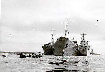 Der beschädigte Tanker Ohio wird von zwei Zerstörer nach Malta eingeschleppt